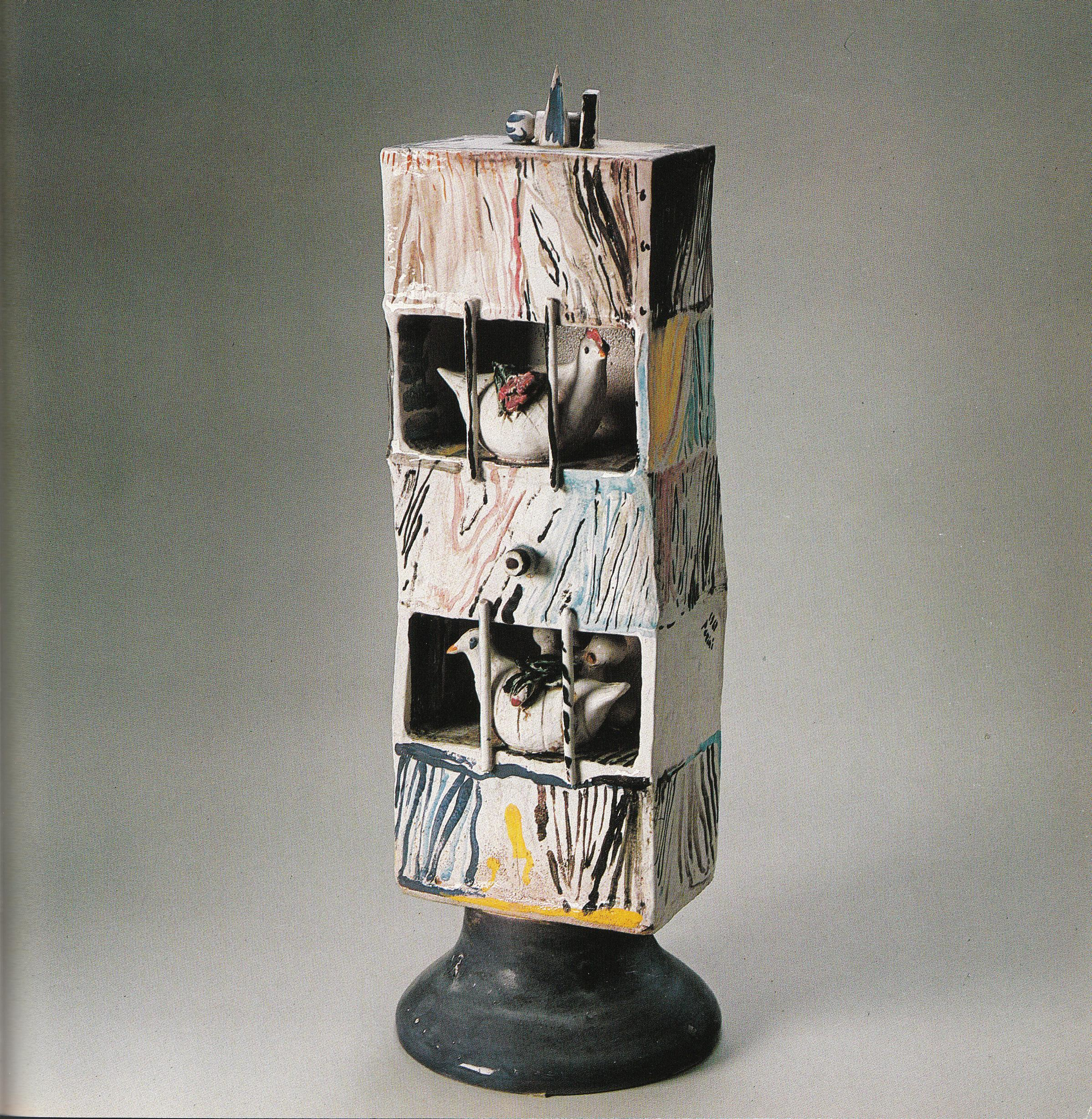 Arcicucco in maiolica, a decorazione policroma, formato da cinque gabbiette sovrapposte, con la parte aperta disposta alternativamente sui due lati, contenenti ciascuna una colomba. Foto per gentile concessione del Comune di Nove, 11/03/2013, Prot. n. 0002470, tratta dal volume "Andrea Parini - Ceramiche 1935-1970", Neri Pozza Editore, 1983